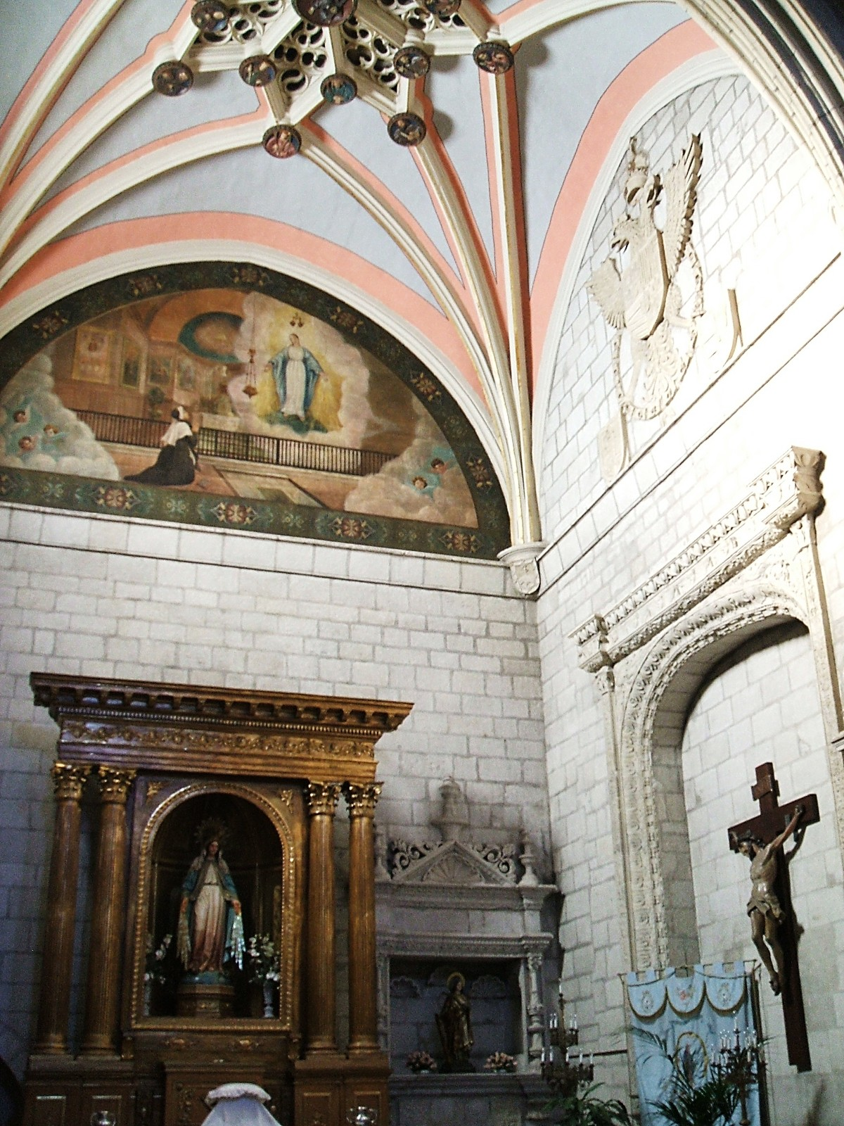 Capilla de la Virgen de la Milagrosa, en la iglesia de San Vicente Mártir, Vitoria-Gasteiz, España/Spain